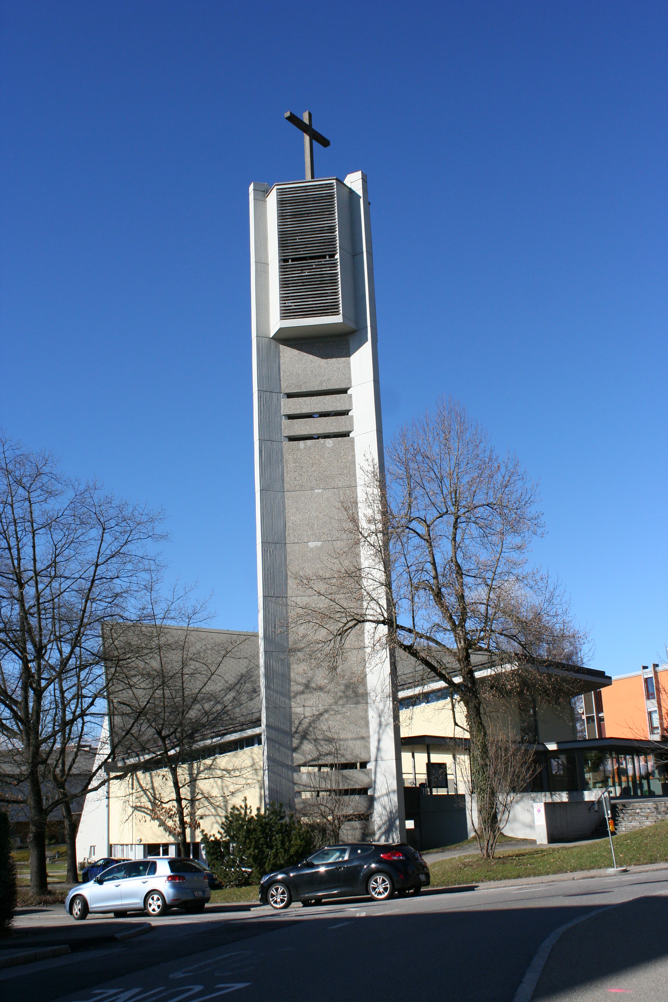 Römisch-katholische Pfarrkirche St. Benignus Pfäffikon ZH, Kirchturm